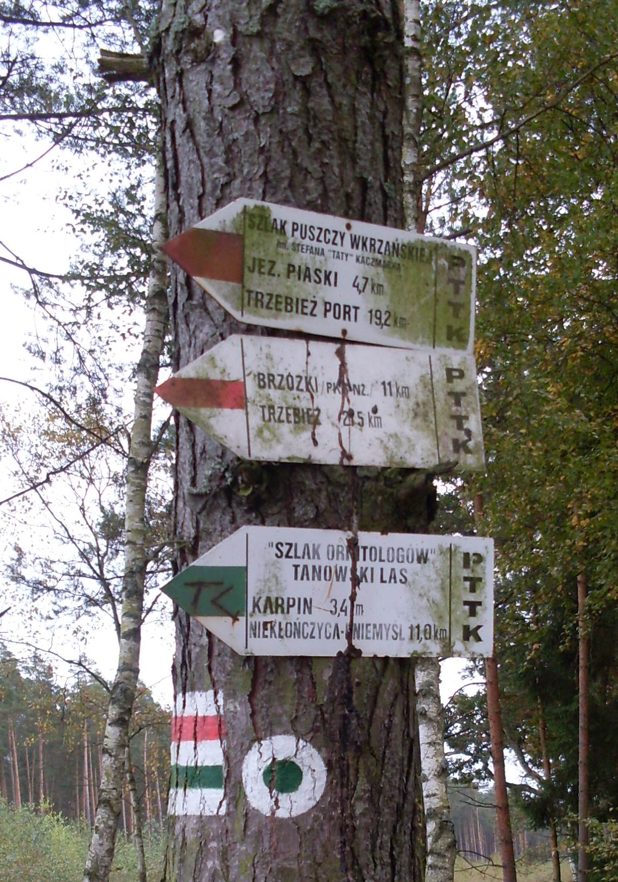 Szlak Ornitologów, Puszcza Wkrzańska